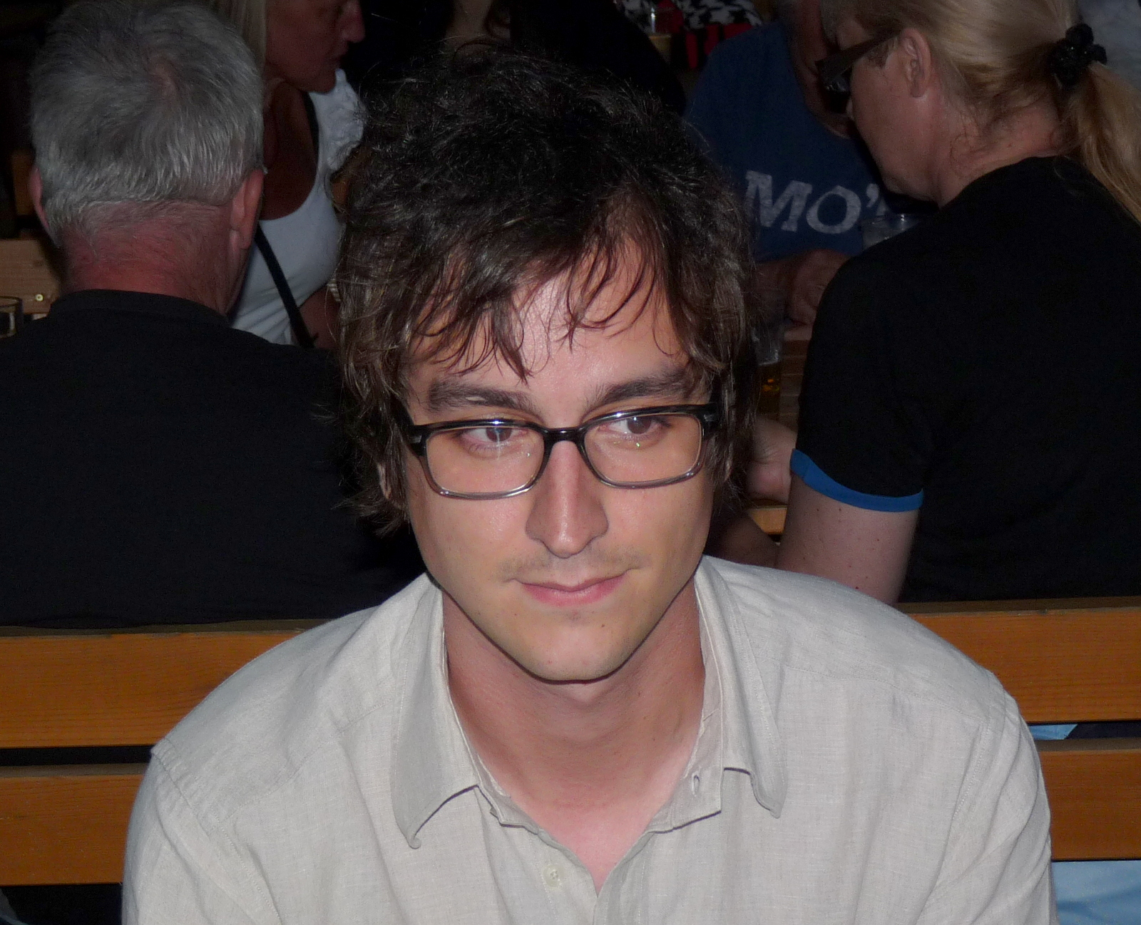 Jasmin B. Frelih, Rožnik 2014